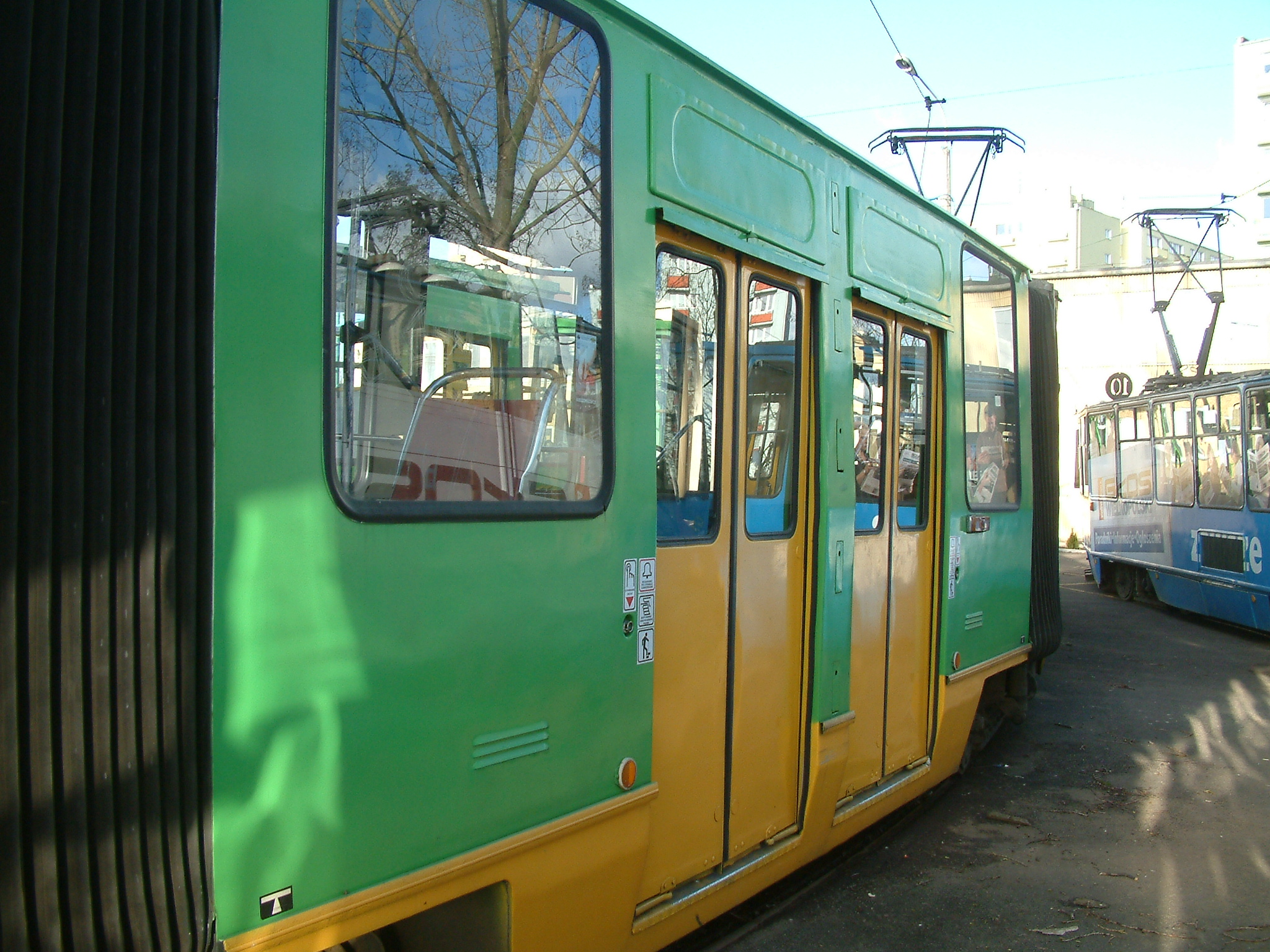 Konstal/HCP 105N/2 (115N) - middle section, Głogowska Depot, Poznań.